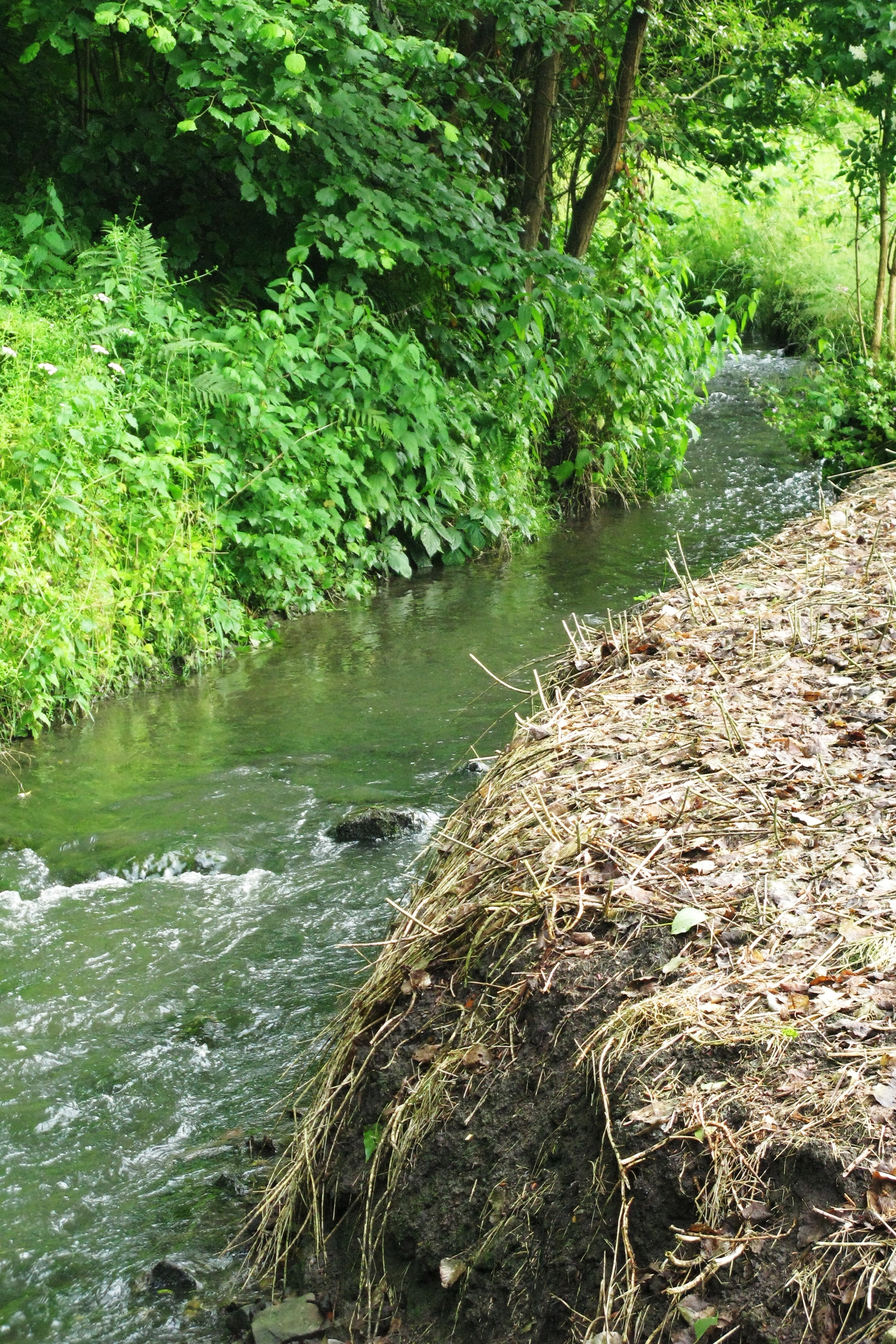 La Julienne au Fond de Legipont